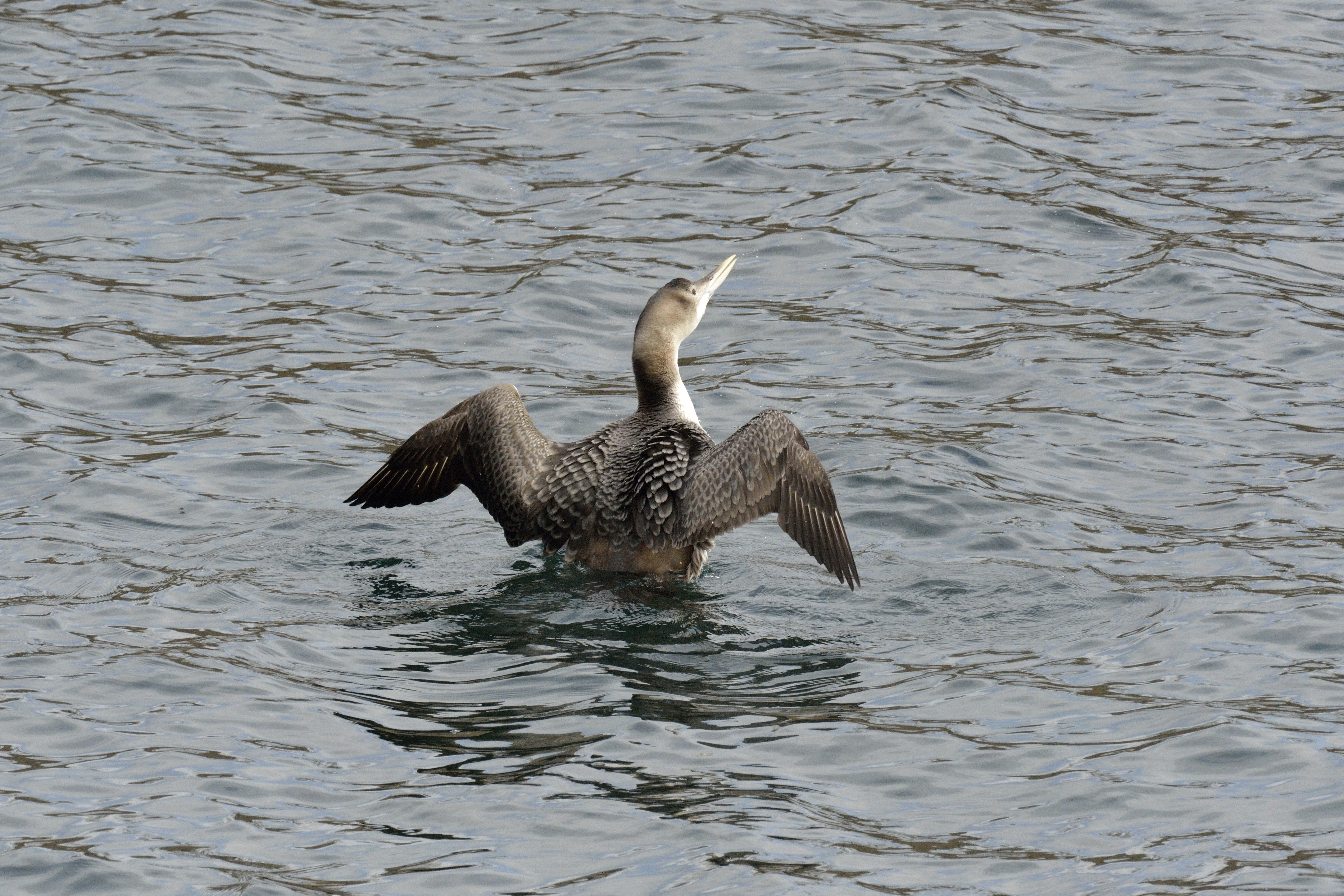 Gelbschnabeltaucher im Bereich der Neuen Donau in Wien